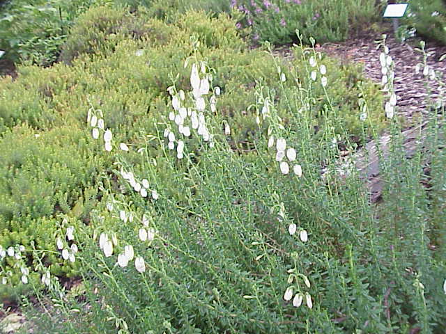 Species: Daboecia cantabrica Family: Ericaceae Image No. 2